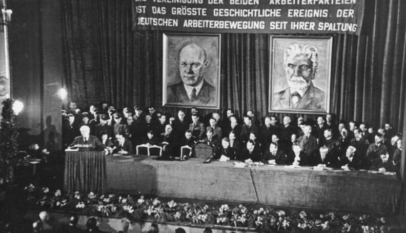 ADN-ZB/IML-ZPA Bezirksparteitag der KPD am 13.4.1946 im Deutschen Theater in Berlin, auf dem die Vereinigung mit der SPD beschlossen wurde. Am Rednerpult Wilhelm Pieck. Der umkränzte Stuhl galt dem Andenken Ernst Thälmanns.